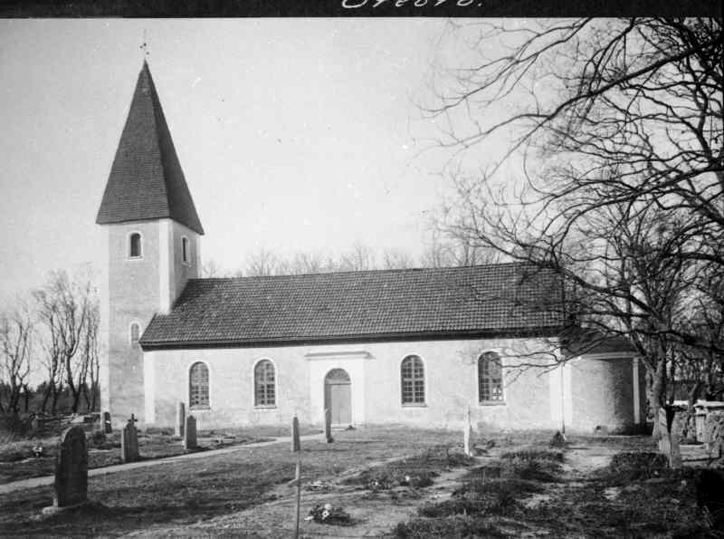 Kyrkan från söder.